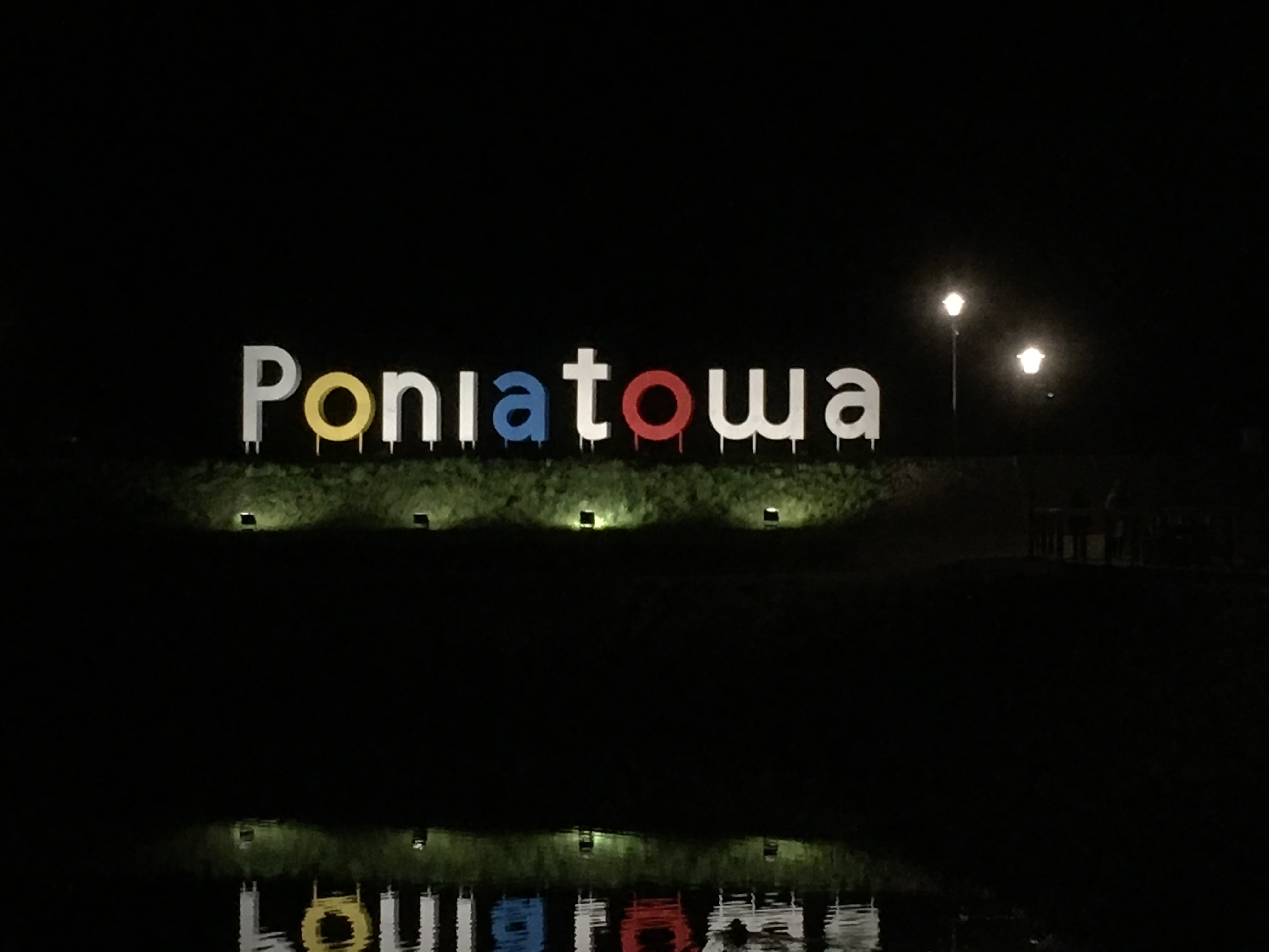 Widok z mostku w ciągu Alei Spacerowej